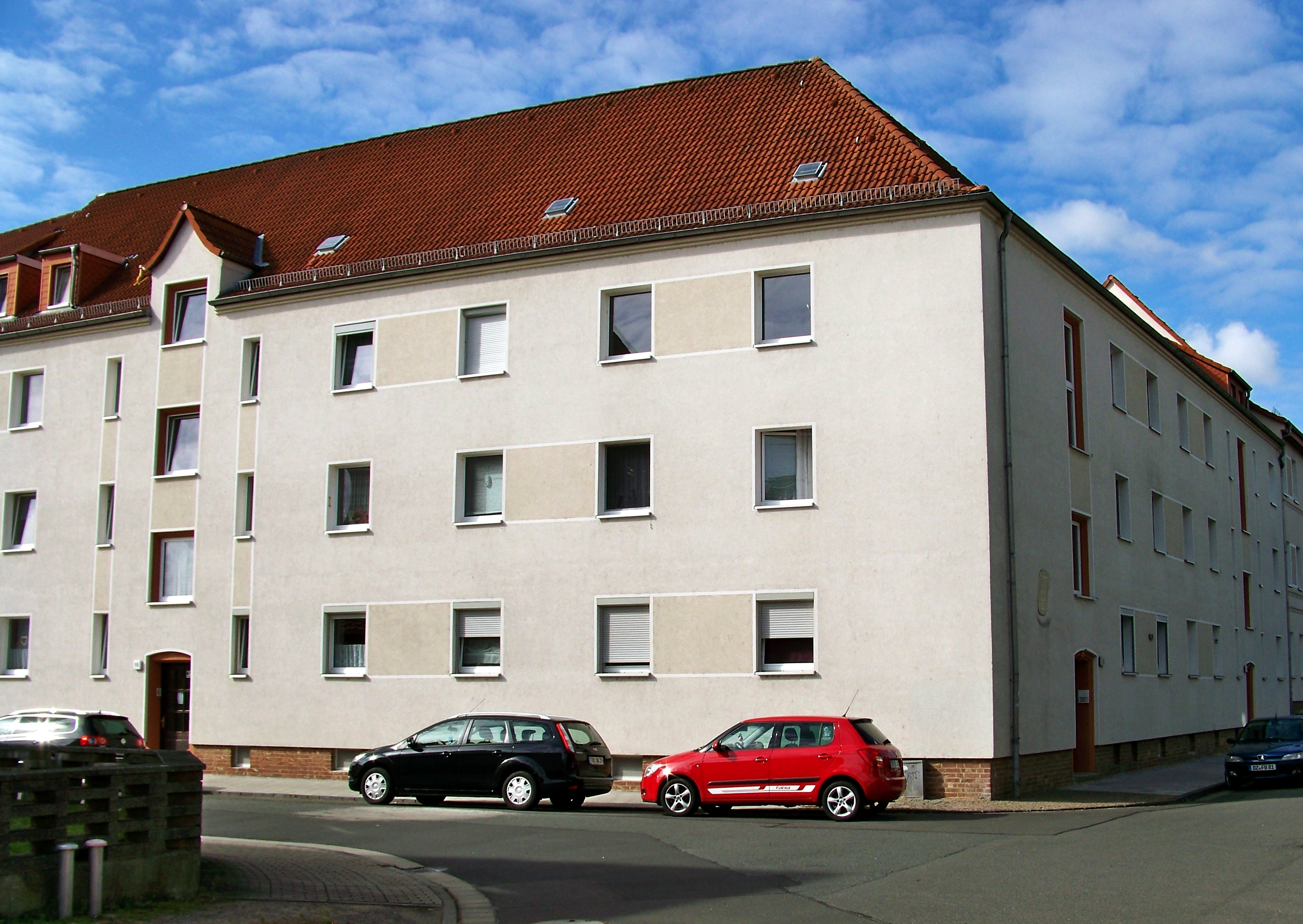 Eckbebauung der Schiller-/Goethestraße in Eilenburg aus den Aufbaujahren nach dem 2. Weltkrieg.